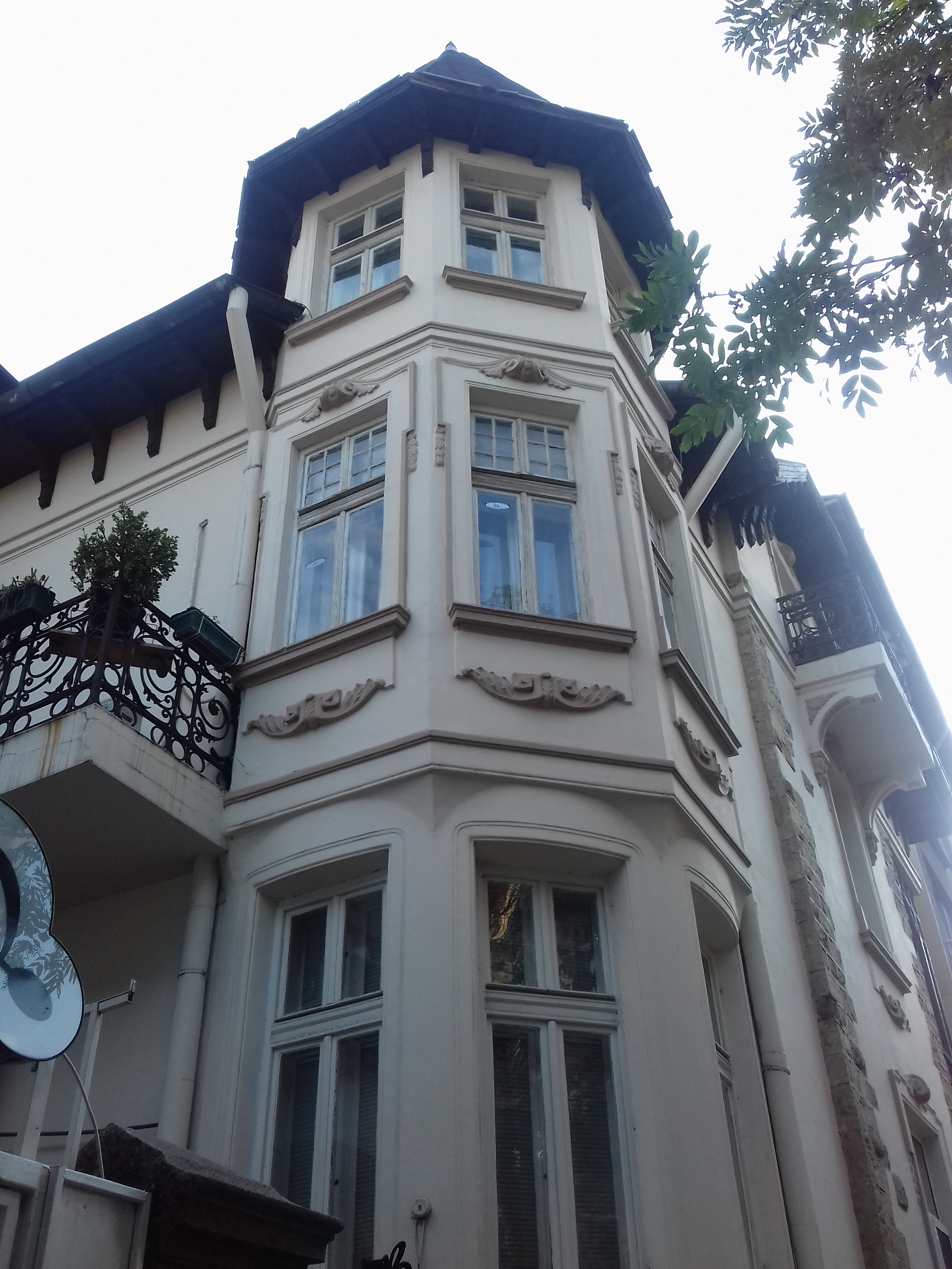 Къщата на Смедовски на улица "Шипка" 44 в София.